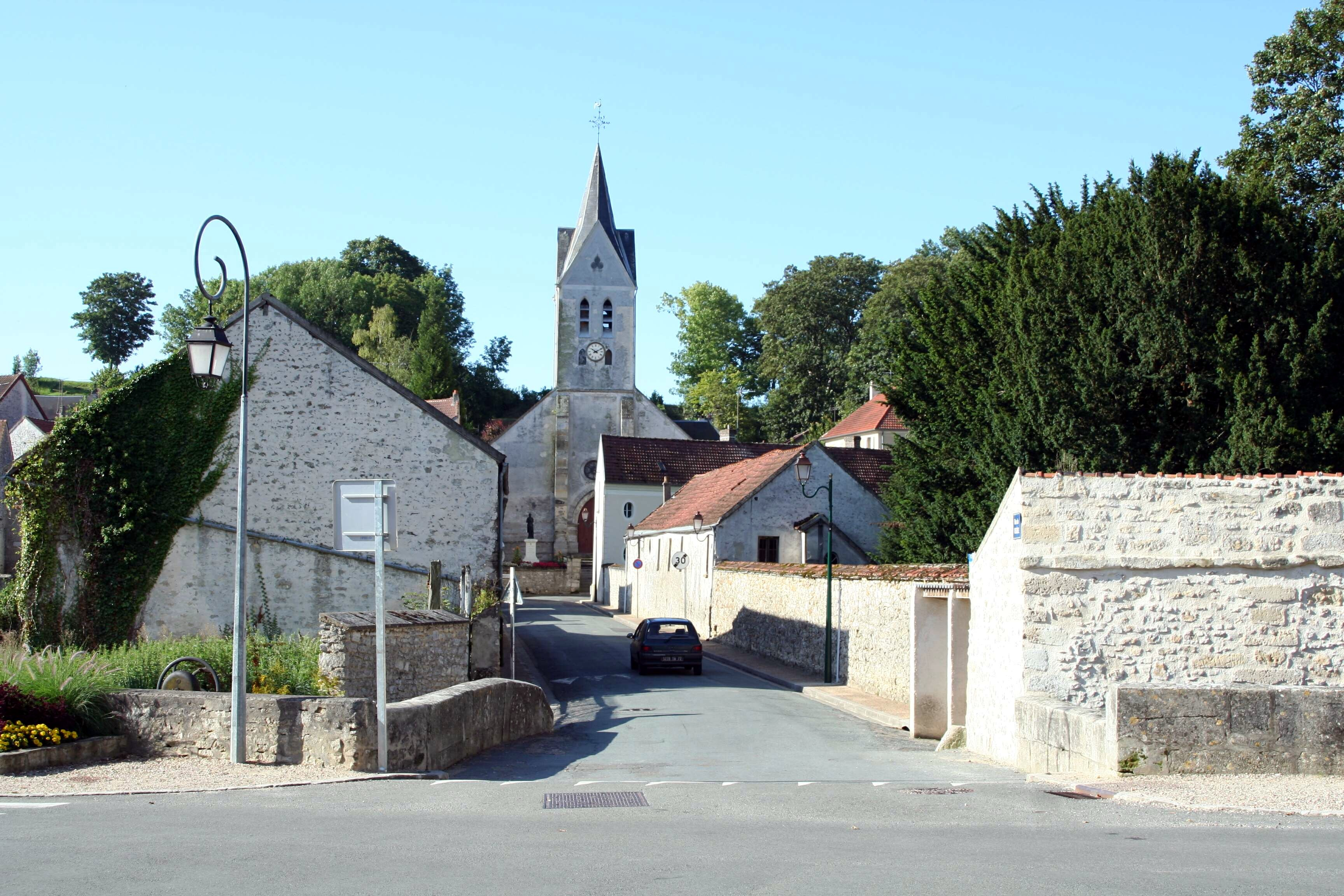 Rue de l'église à Sailly - Yvelines (France)